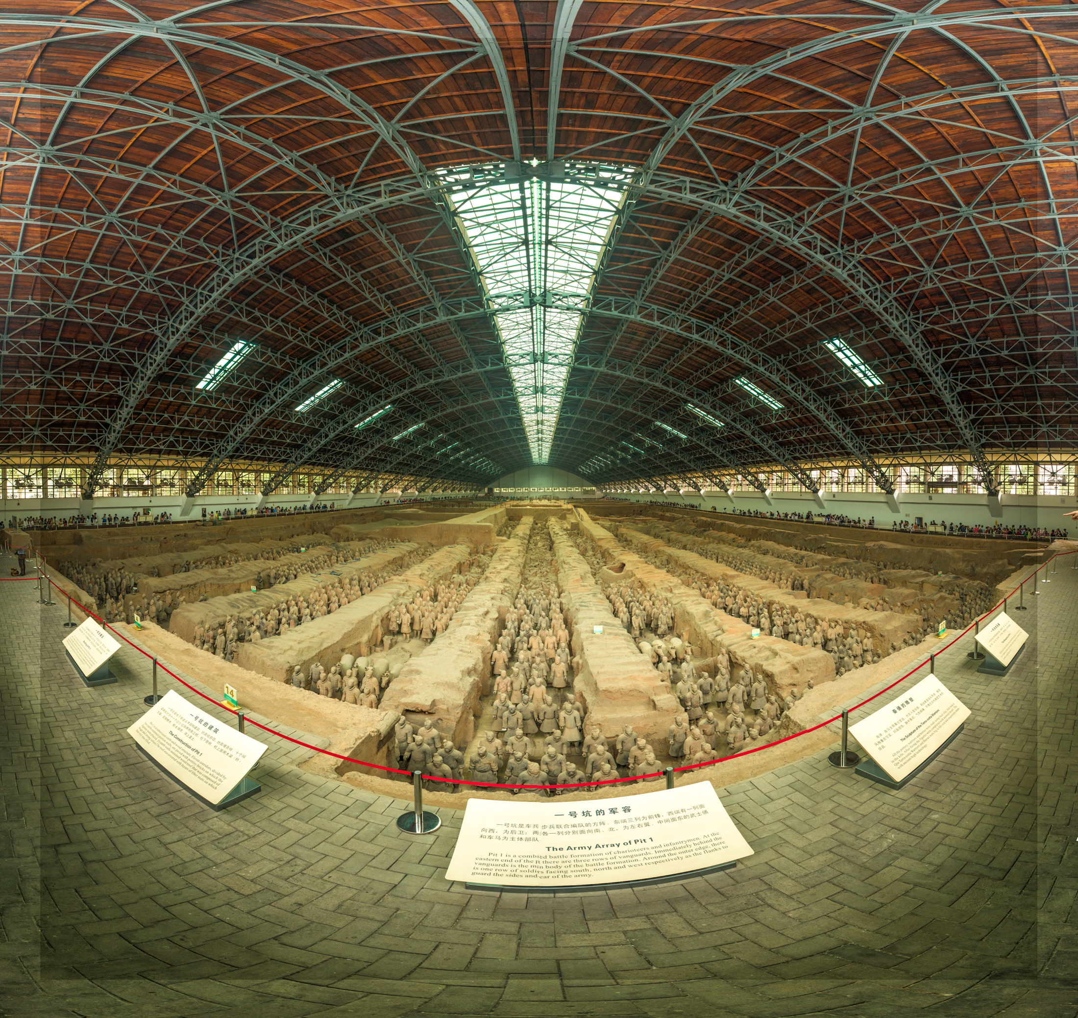 Ni un solo documento hablaba de las 8 mil piezas del ejército de terracota enterradas junto a la tumba del emperador, todas en tamaño real, distintas unas de otras y trabajadas con excepcional talento. Ocultas en la historia hasta una mañana en que un trabajador, al escarbar un pozo, dio con el que pudiera ser uno de los mayores hayazgos arqueológicos de nuestro tiempo. Un antiguo techo de madera mantuvo en muy buen estado las piezas durante poco más de 2,200 años, hoy resguardadas en un inmenso galerón cerca de la ciudad de Xi'An.